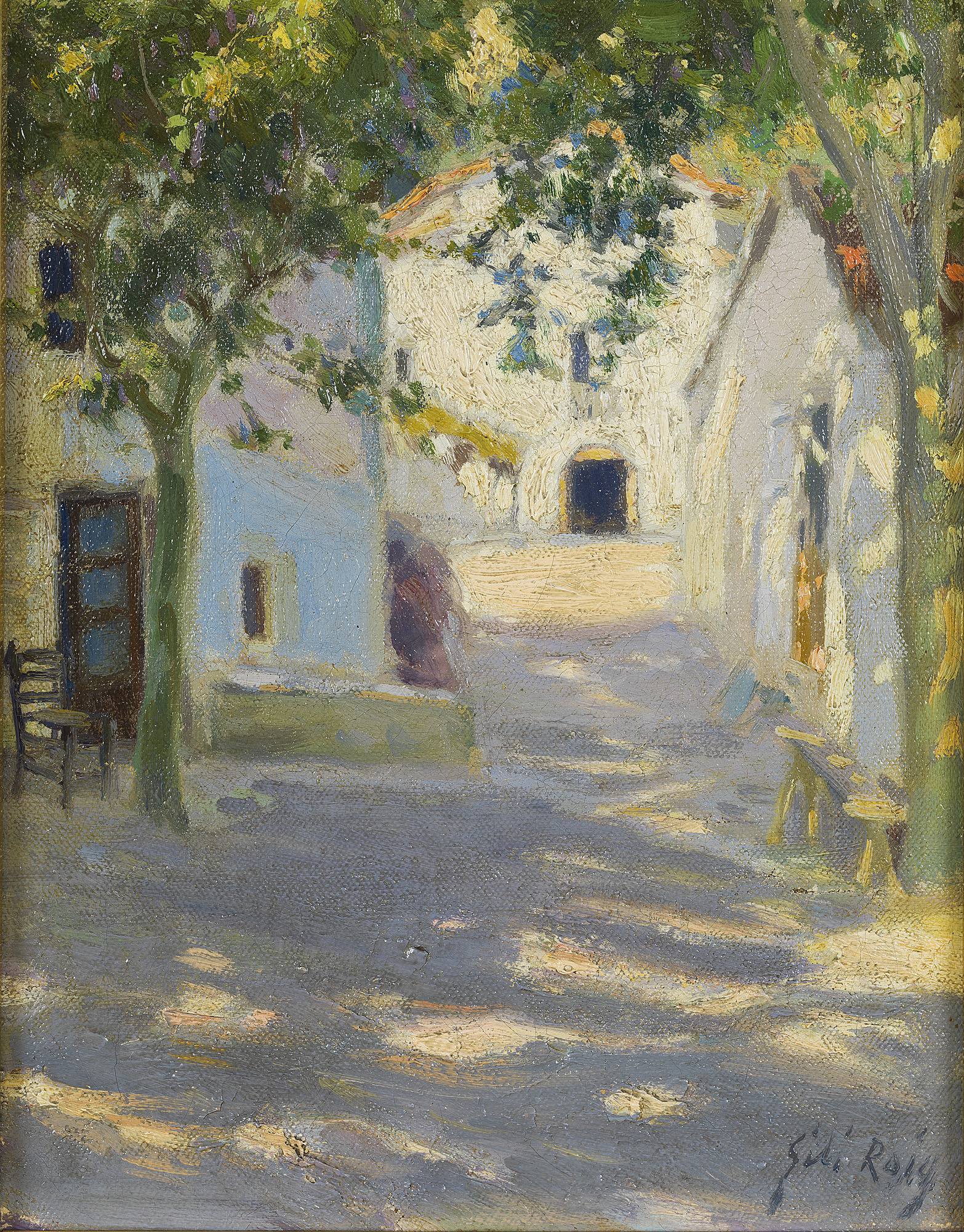 Quadro de Baldomer Gili Roig, titulat Carrer al sol, pintado hacia 1900.